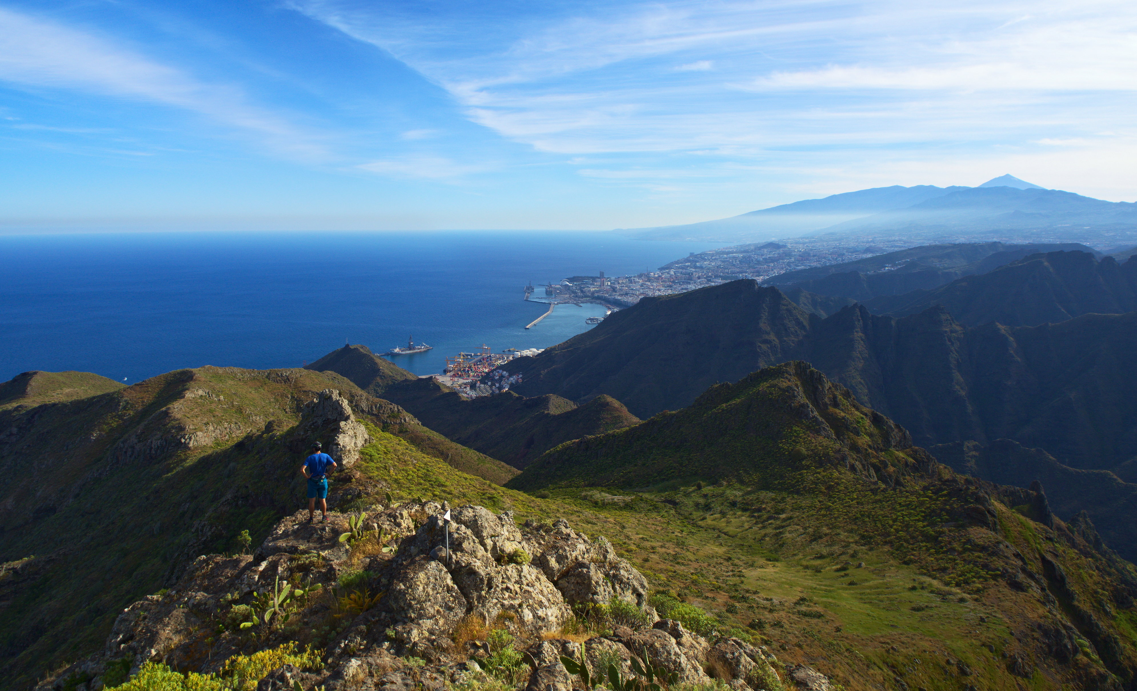 Bahía de Santa Cruz hasta el Teide vistos desde la cresta del Roque Chiguel a la izquierda del Barranco de Cueva Bermeja.Detrás del chico los Picachos y Cabezo del Incensial. Más a la derecha Gollada Camajato, Cabezo de Mancha de los Cardos, Cabezo del Quicio, Lomo de las Canteras, Cabezo las Casas de Abajo, dos torres, Gollada la Veta, torre, Lomo Pelado.Cabezo los Corchos encima de la Mesa del Ramonal, Cabezo Jurao, Cabezo los Muertos.Cabezo Mesas del Cautivo.Montaña de La Leña y Los Campitos, Roque de Las Cabezadas.Montaña de Taco, Montaña de OfraMontaña Jagua, Montaña Talavera, Montaña Birmagen.TeideProjection: Rectilinear (0); FOV: 79 x 67; Ev: 13.14